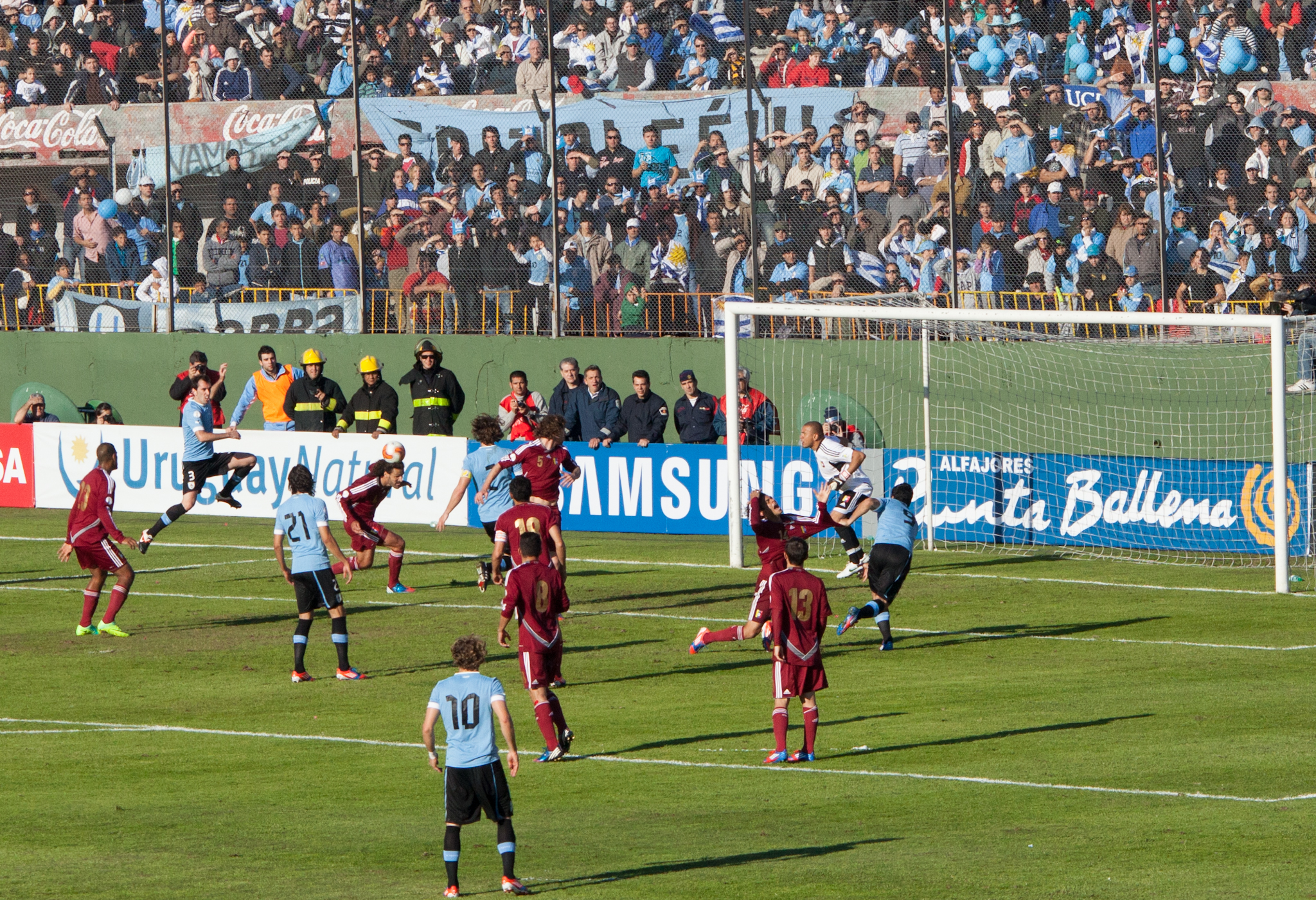 Uruguay: Fernando Muslera; Maximiliano Pérez, Diego Lugano (m.78, Sebastián Coates), Diego Godín, Martín Cáceres; Diego Pérez (m.74, Álvaro González), Egidio Arévalo Ríos, Álvaro Pereira; Diego Forlán (m.87, Sebastián Abreu), Luis Suárez y Edinson Cavani. Seleccionador: Oscar Washington Tabárez. Venezuela: Renny Vega; Roberto Rosales, Oswaldo Vizcarrondo, Fernando Amorebieta, Gabriel Cichero; Tomás Rincón, Luis Manuel Seijas (m.87, Grendyy Perozo), Giácomo Di Giorgi (m.74, Yohandry Orozco), Frank Feltscher (m.54, Nicolás Fedor), Juan Arango; y Salomón Rondón. Entrenador: Cesar Farías. Goles: 1-0, m.38: Diego Forlán. 1-1, m.83: Salomón Rondón. Árbitro: Antonio Arias. Estadio Centenario, Montevideo, Uruguay. Camera: Canon EOS 5D Mark II Lens: Sigma 150-500mm f/5-6.3 AF APO DG OS HSM 0 ISO: 800